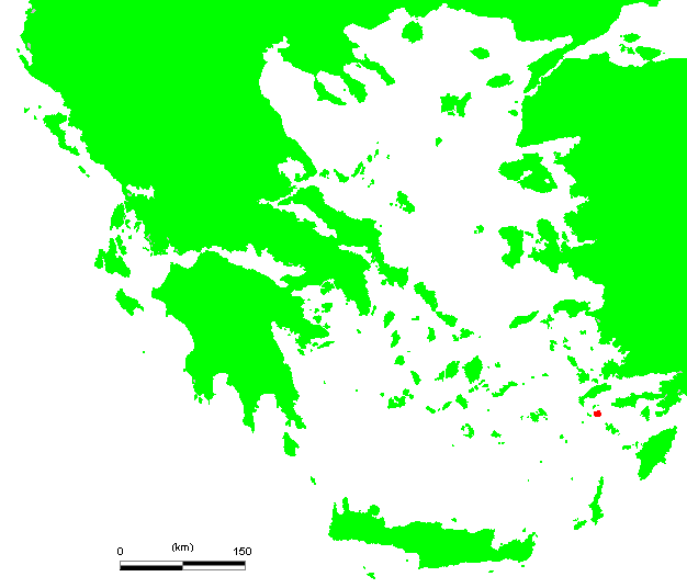 GR Nisyros.PNG (Greek island)